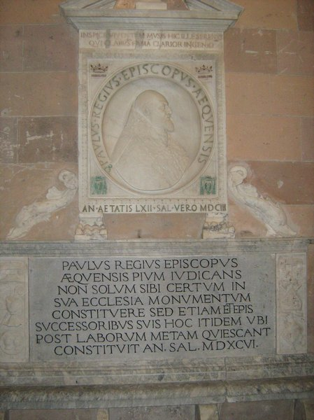 Tomba del Vescovo di Vico Equense Paolo Regio Cattedrale SS. Annunziata